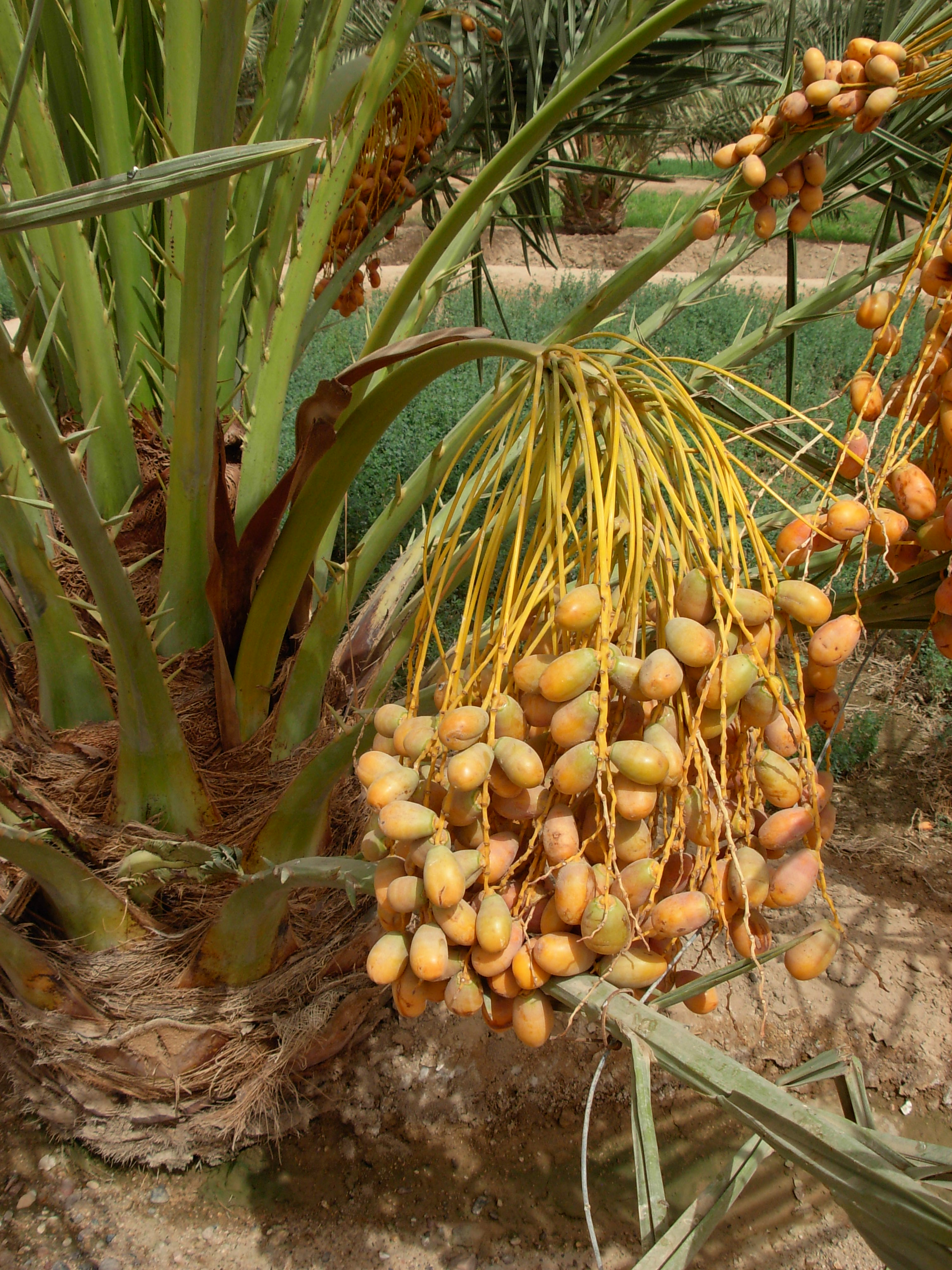 വിളഞ്ഞു വരുന്ന ഈന്തപ്പഴം, കുവൈറ്റിൽ നിന്നുള്ള പടം.